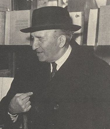 фотография итальянского писателя Винченцо Кардарелли, сделанная до 1959 года; автор неизвестен